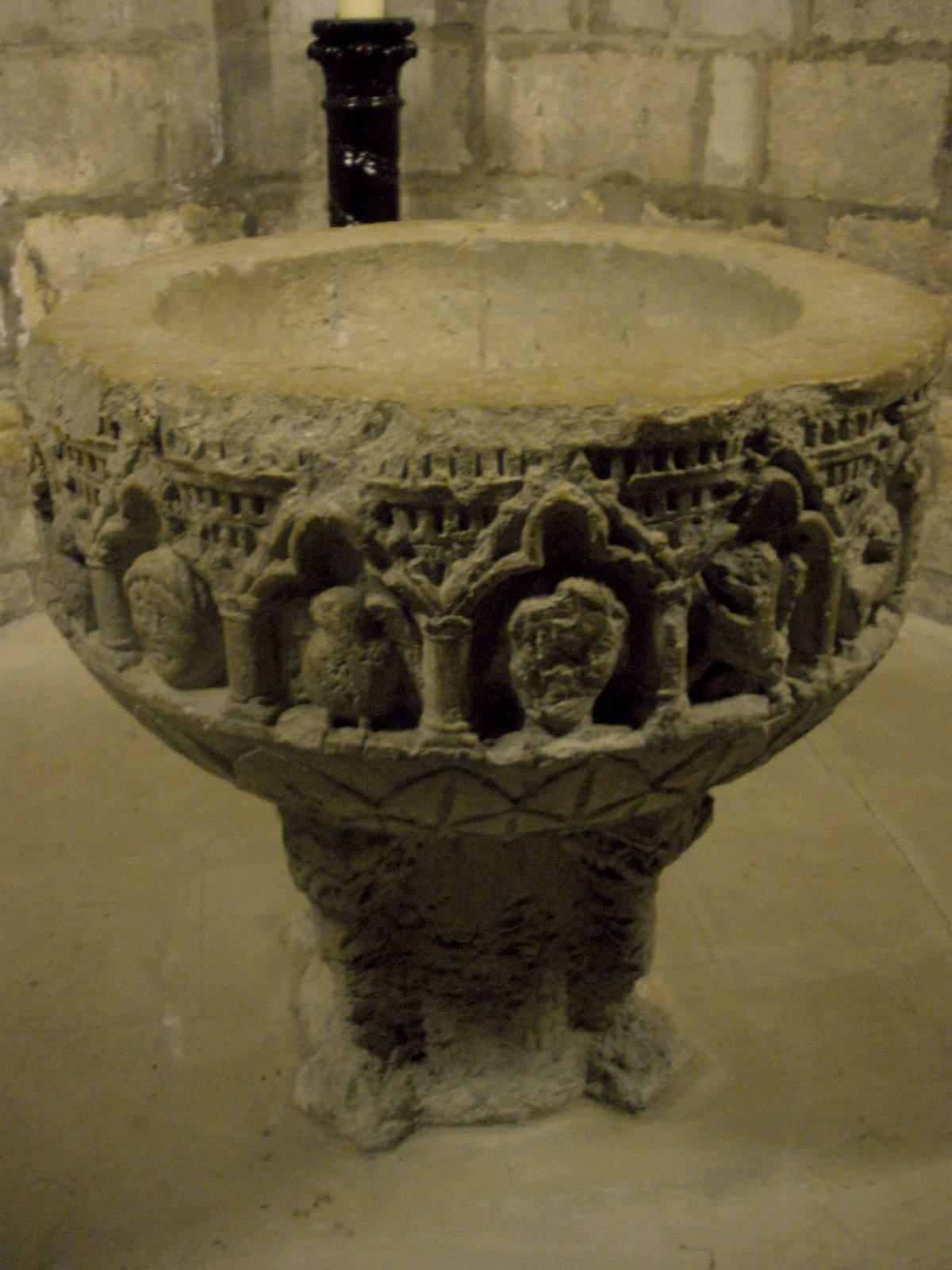 Monasterio de Nuestra Señora de Estíbaliz (Álava)